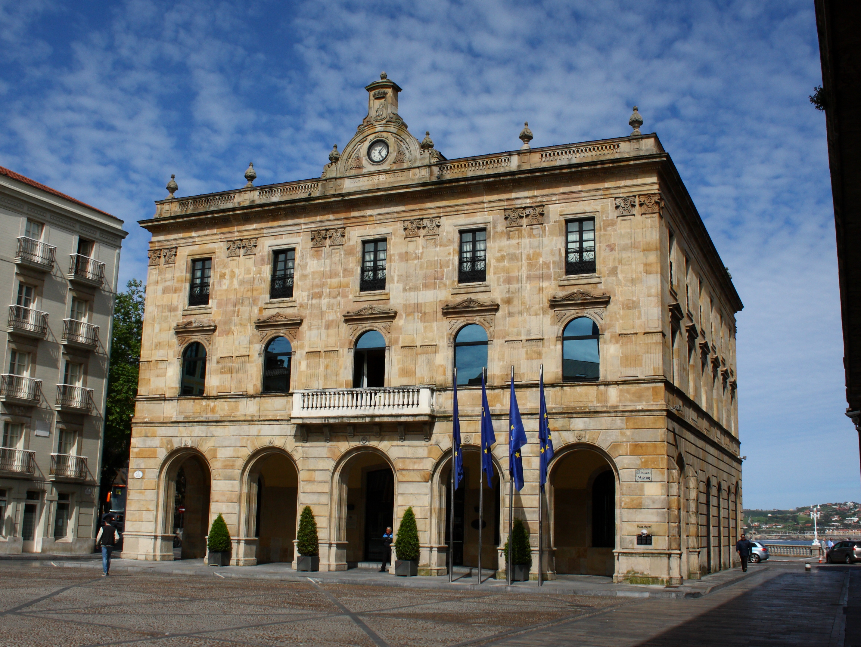 Ayuntamiento de Gijón